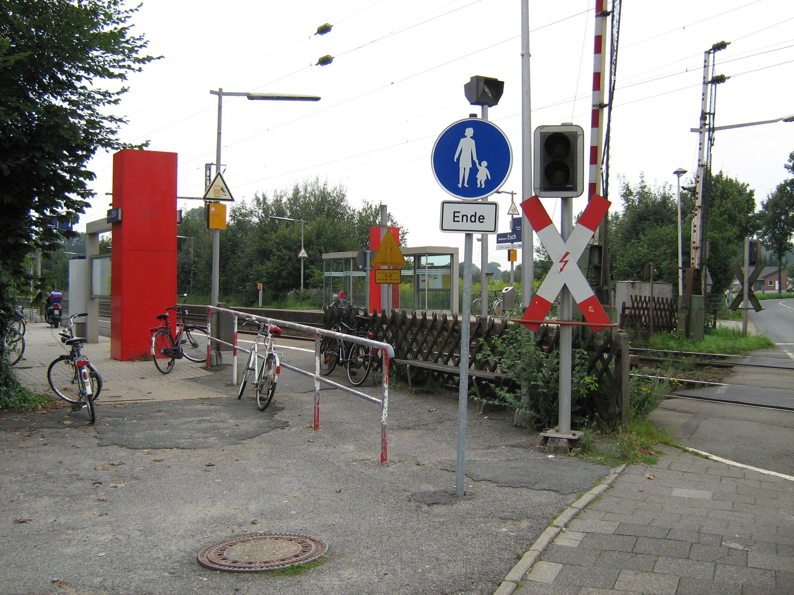 Haltestelle_Ibbenbüren-Esch (NRW)